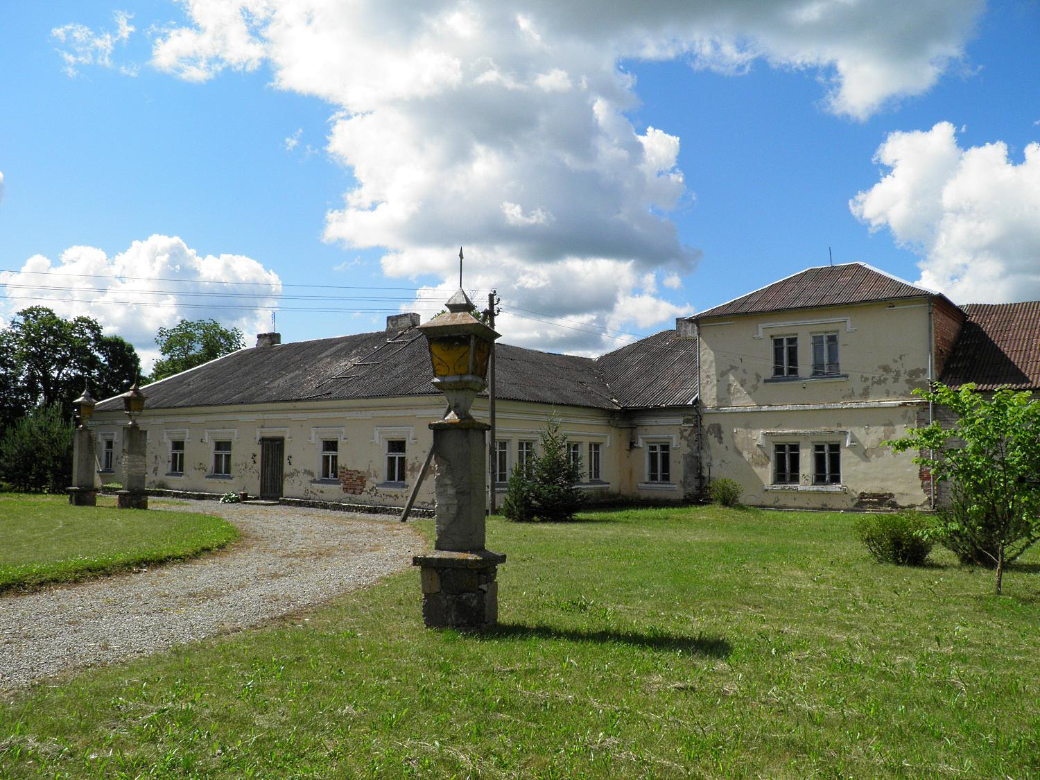 Antanašės dvaras (1)